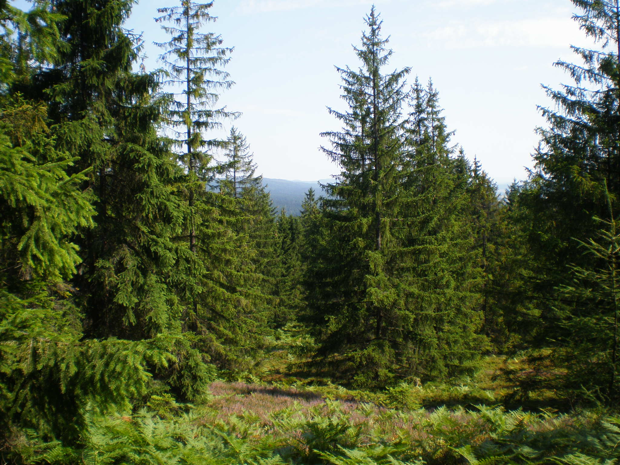 Rozvolněný les v JV svazích Toku